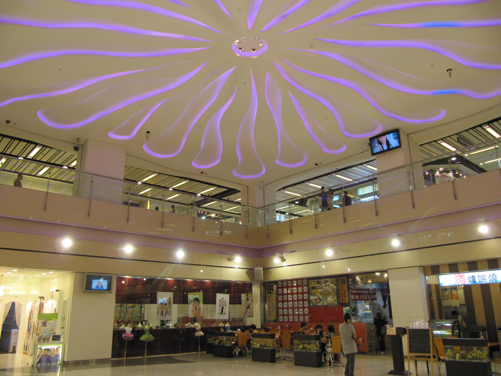 領匯將軍澳南豐廣場